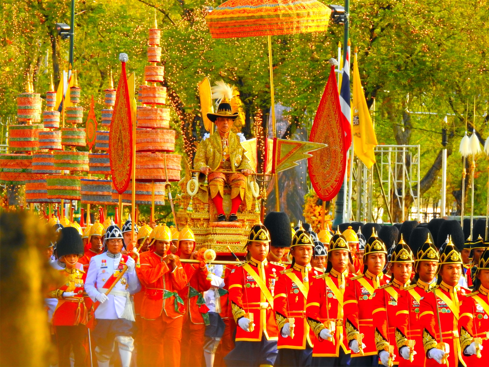 พระราชพิธีบรมราชาภิเษก พุทธศักราช 2562